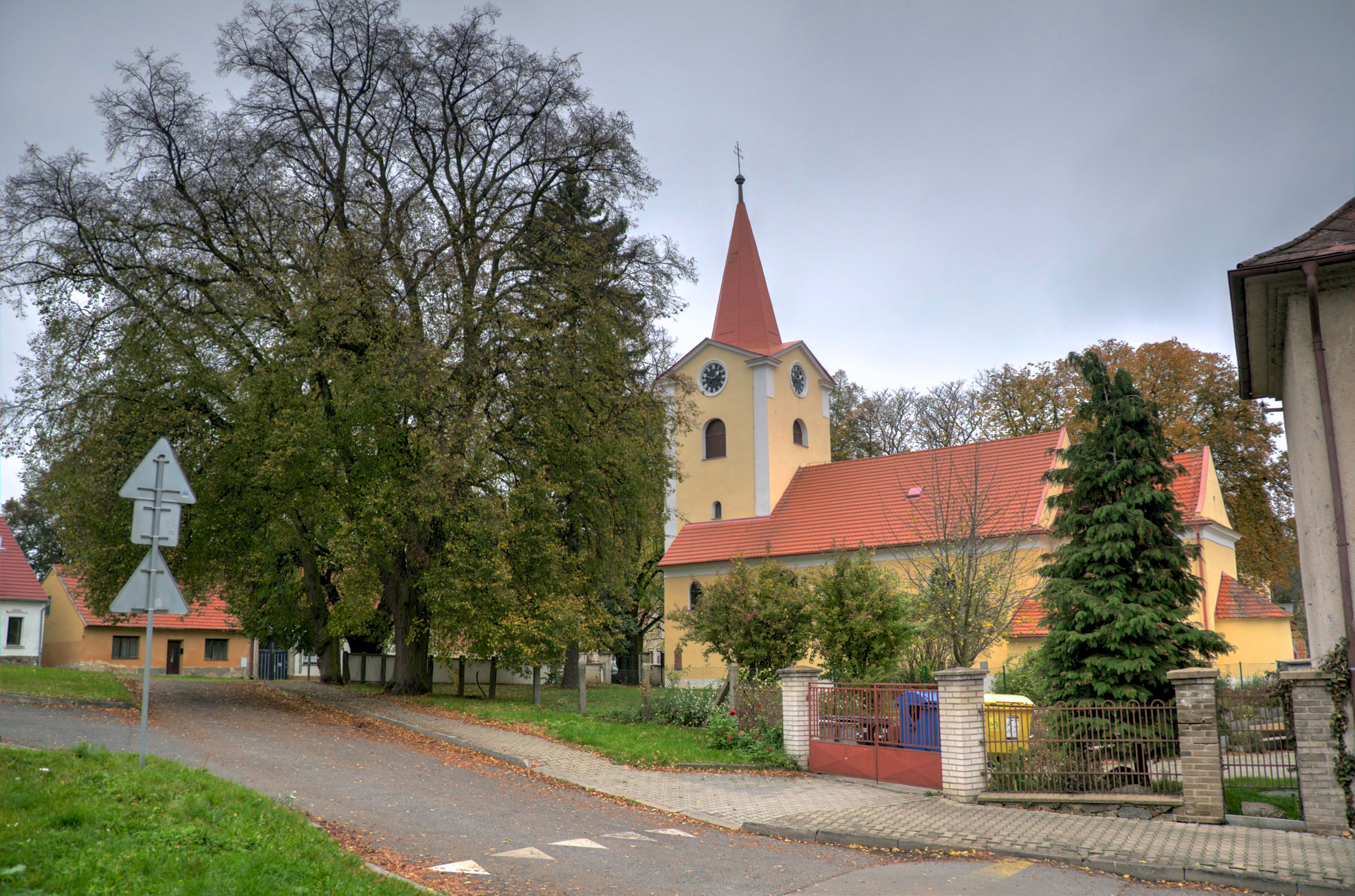 Kostel svatých Šimona a Judy, u náměstí, Ondřejov.